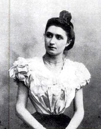 Nelly Roussel (1878-1922), anarchica francese